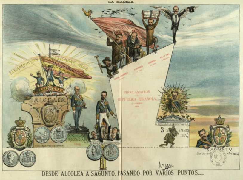 Caricatura do Sexenio Democrático, publicada no nº 9 da revista "La Madeja" (que substituía a La Flaca), o 14 de marzo de 1875